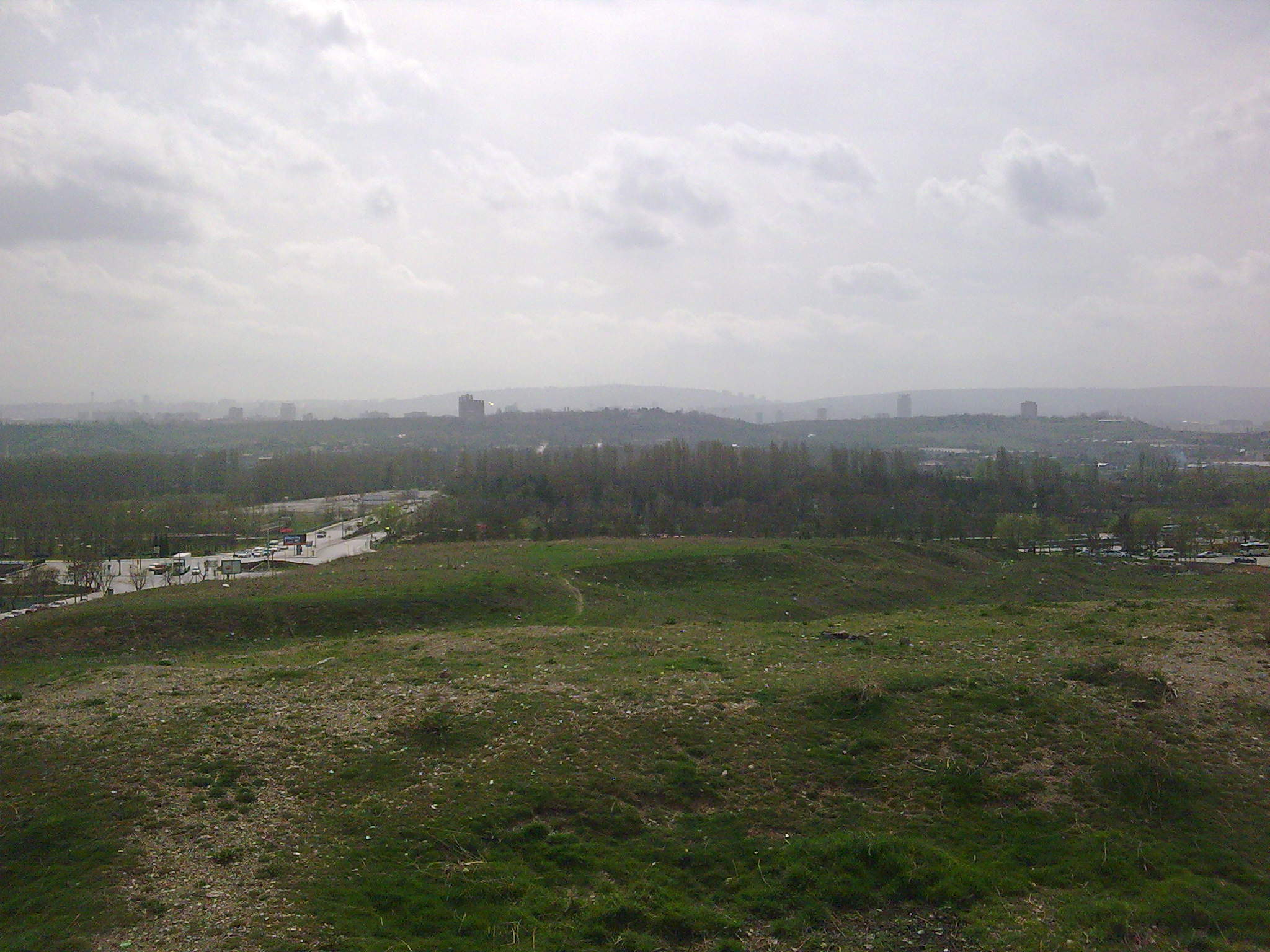 Yumurtatepe Tümülüsü'nden üstünden bir görünüm Sol kenarda arabaların göründüğü yer Çiftlik Kavşağı'dır.